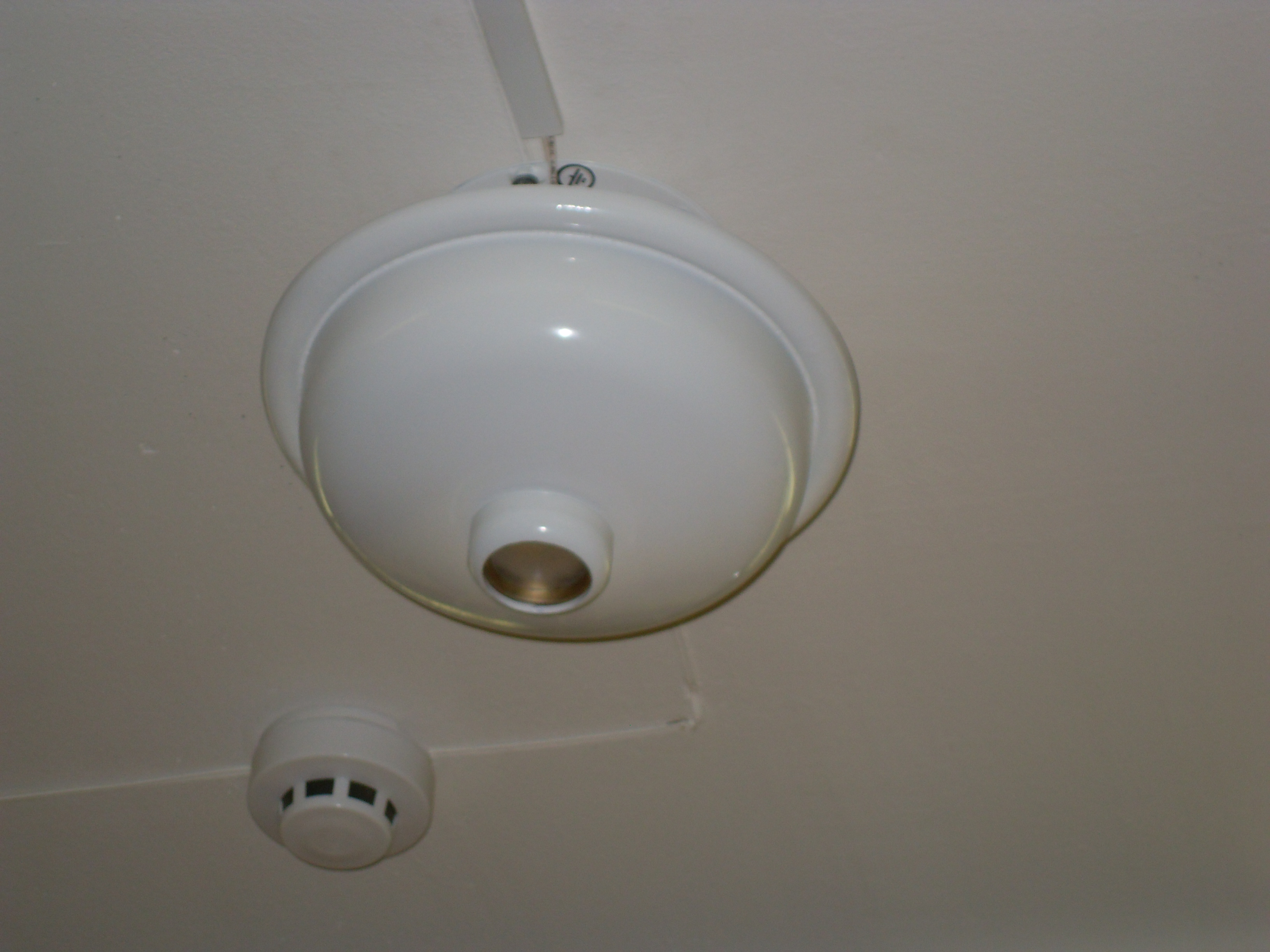 Система порошкового пожаротушения. На фотографии показаны модуль пожаротушения и дымовой извещатель.